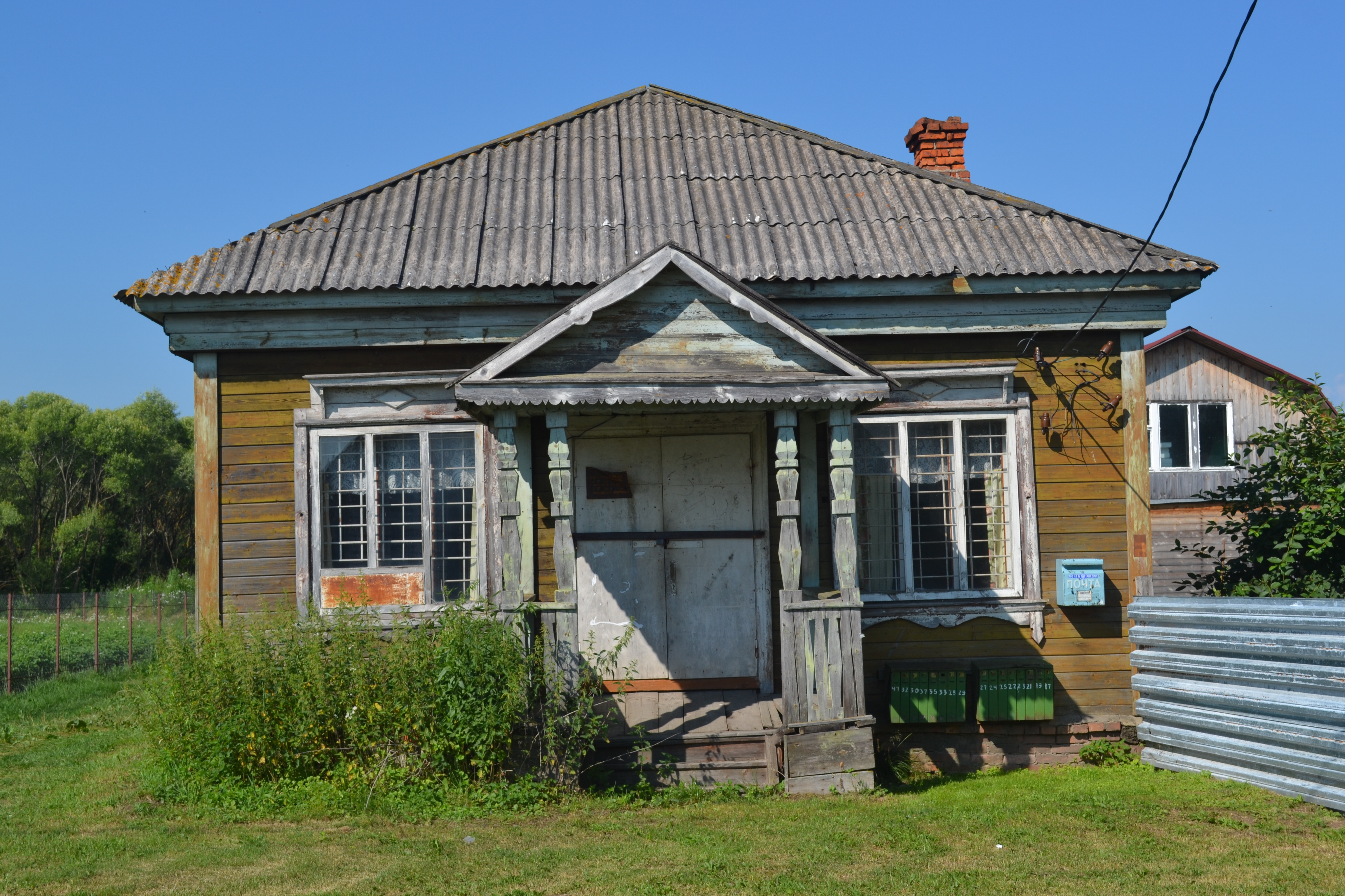 Деревня Горелово (Шатурский район)